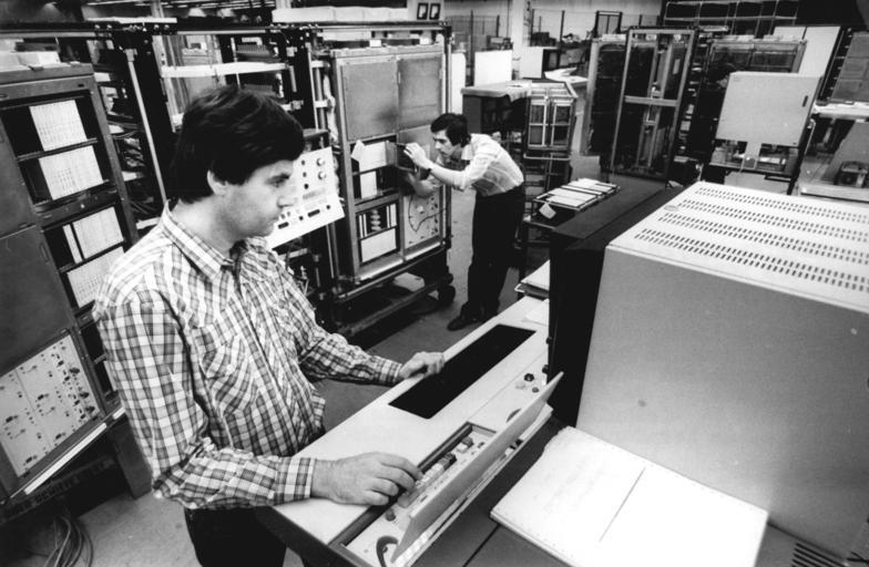 VEB Robotron Elektronik Dresden, Computer Newa 1M ADN-ZB Hiekel 28.11.84 Dresden: Wettbewerb- Die Werktätigen des VEB Robotron-Elektronik Dresden, Stammbetrieb des VEB Kombinat Robotron, streben 1985 einen weiteren Leistungszuwachs in der Produktion von Erzeugnissen für die Rationalisierung volkswirtschaftlicher Prozesse und den Export an. Der Doppelrechner des Typs Newa 1M geht demnächst auf die Reise in die UdSSR. Die Ingenieure Bernd Hentschel (l.) und Roland Ziervogel beim Überprüfen der Anlage. Seit über zehn Jahren bewährt sich in der Sowjetunion die EDV-Technik aus dem Dresdner Kombinat. Anwendung findet sie u.a. im Kernforschungsinstitut Dubna und im Automobilwerk Kama.